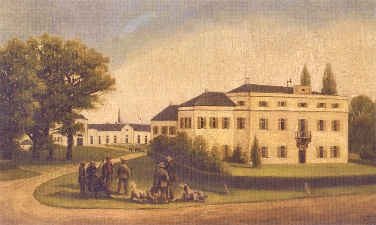 Gemälde des Schlosses Oberhausen